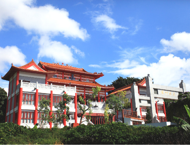 中文（香港）: 思親公園為香港一座道教骨灰龕堂，位於屯門楊青路25號，佔地約3,600平方米，由仁濟醫院及蓬瀛仙館合作興建，耗資逾1億6千萬港元，於2012年12月落成，及後於2013年3月24日正式啟用，園內環境清幽，莊嚴潔淨。